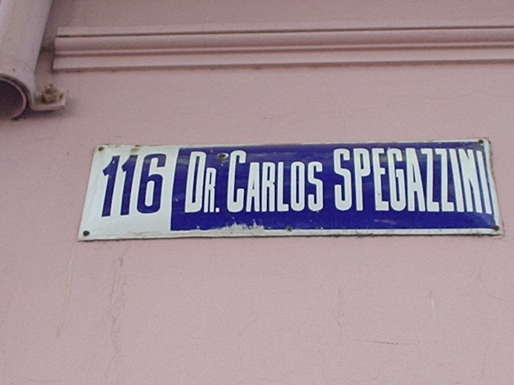 Nomenclatura de la calle 116 Doctor Carlos Spegazzini en La Plata